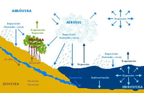 Esquema de movilidad de contaminantes